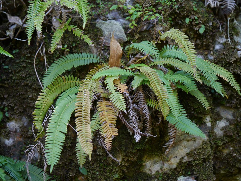 Blechnum amabile：オサシダ 2014/10/18 和歌山県田辺市：Tanabe City. Wakayama Pref. Japan